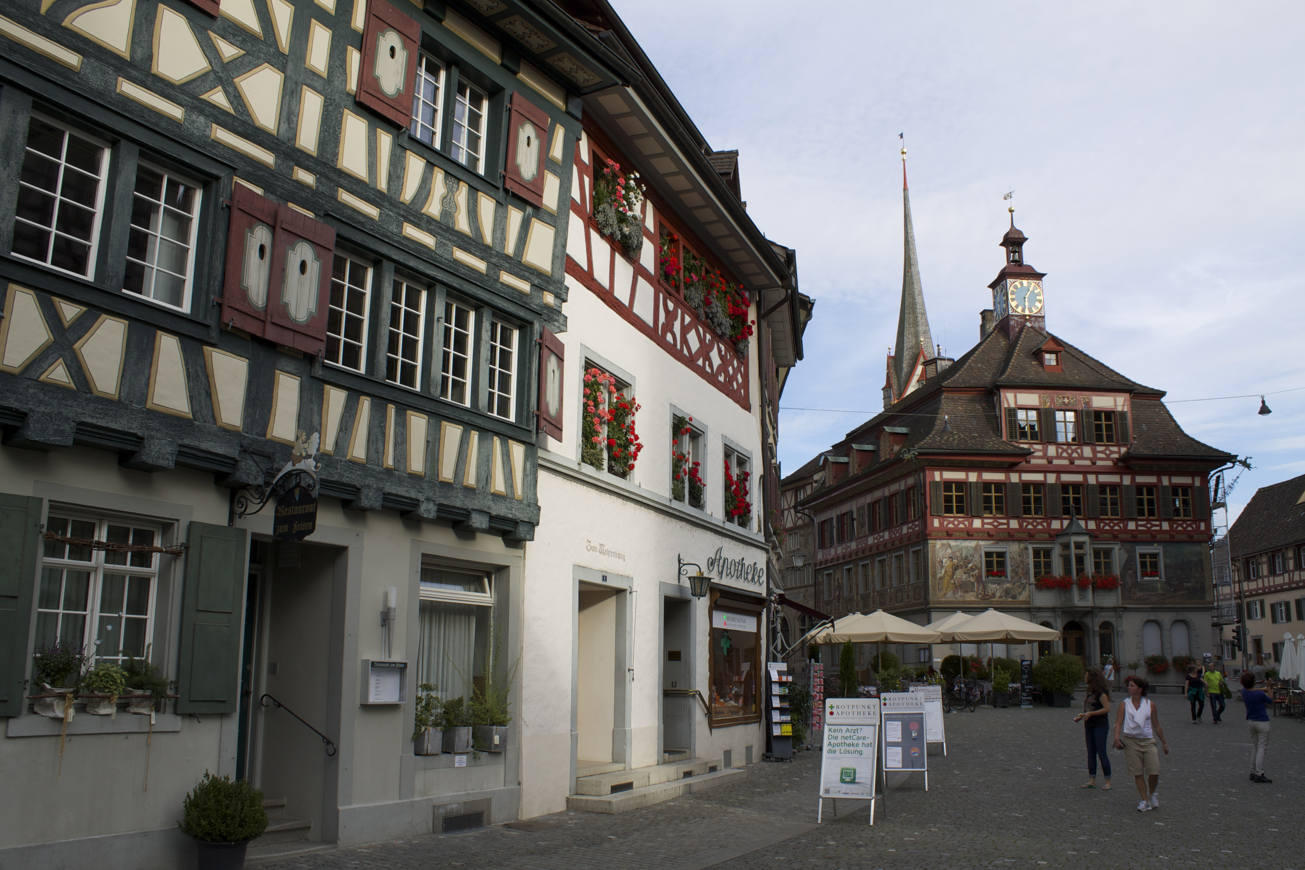 Stein am Rhein , Schaffhausen , Switzerland